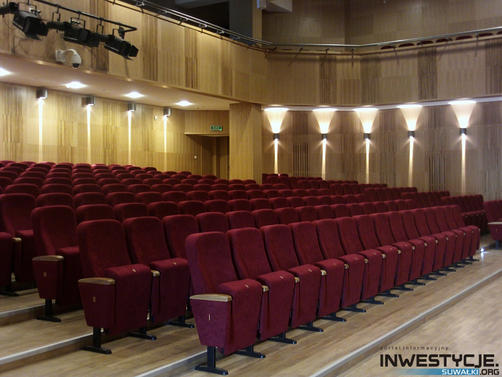 Państwowa Szkoła Muzyczna w Suwałkach po przebudowie w latach 2010-2012.